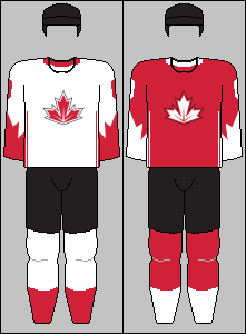 Canadian national team jerseys from World Cup of Hockey 2016 ... Big thanks to Realismadder for a large share on these jerseys.